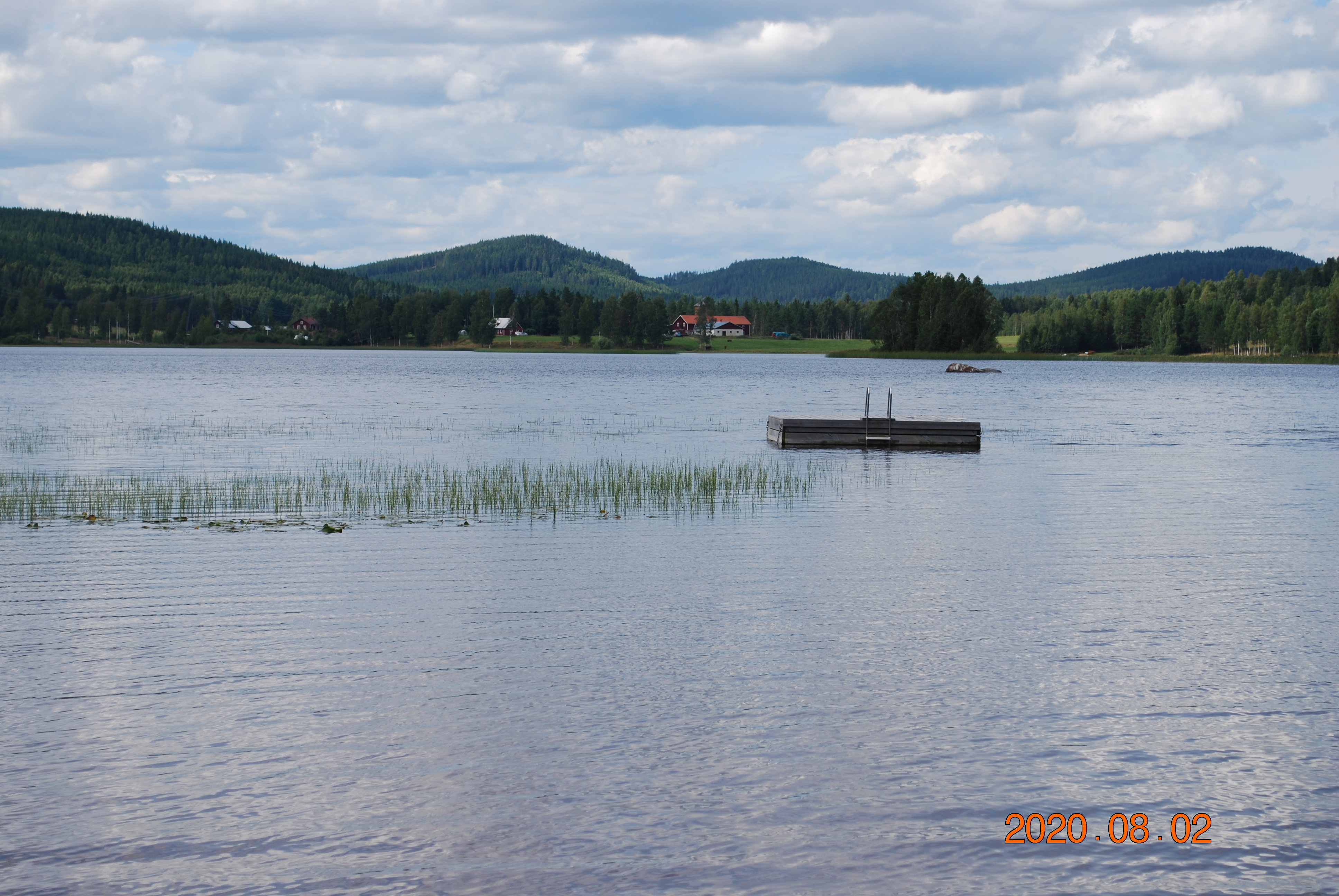 Bilden visar en vy av Tönssjön från badplatsen med bebyggelse på norra sidan av sjön med bergen Lundsberg, Östra Stack och Middagsberget i bakgrunden.